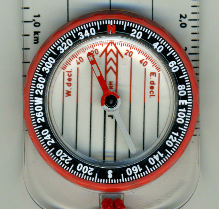 Buzola Silva Ranger, detail otočného kotouče se stupnicí azimutů, magnetické deklinace a ryskami pro srovnání v severojižním směru dle střelky nebo mapy.